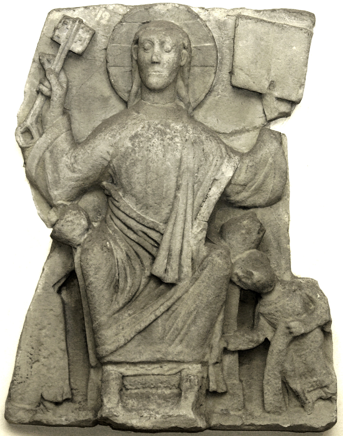 Bremer St. Petri Dom: Christusrelief (um 1050) in der Westkrypta. Befand sich wahrscheinlich als Tympanon-Figur über dem Westeingang des frühen Adalbert-Domes. Der thronende Christus symbolisiert den an die bremischen Erzbischöfe gerichteten Missionsbefehl. Die linke Hand weist auf das Evangelium als neue Lehre, die Rechte hält den zweibärtigen Schlüssel als Zeichen der Macht im Himmel und auf Erden. Die Herkunft des Künstlers weist nach Köln. (Qu.: Der Dom zu Bremen, ISBN 3-7845-4231-X)